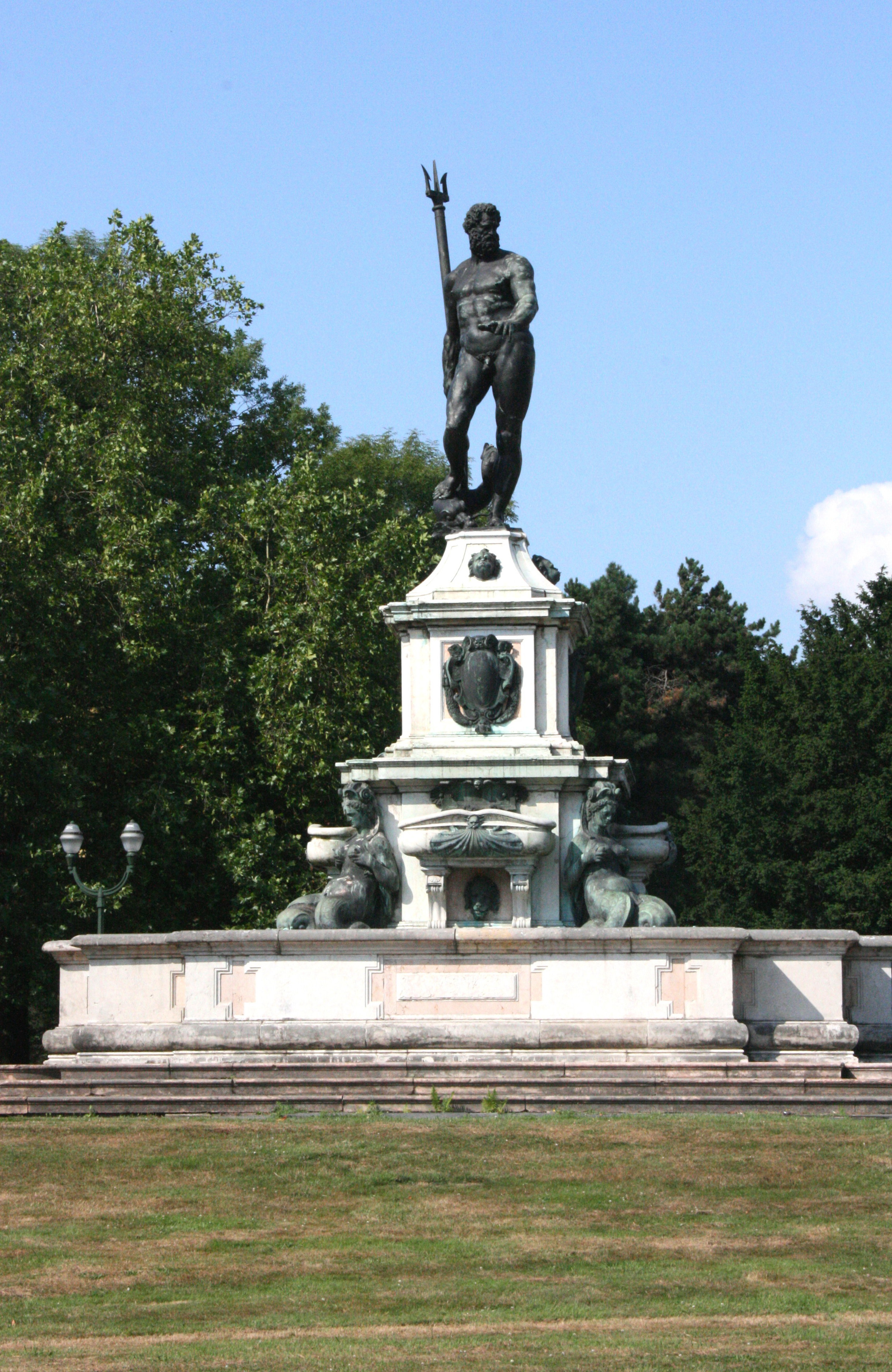 Fontaine de Neptune, avenue Jules Van Praet, Laeken ( Bruxelles), Belgique. Copie de l'oeuvre du sculpteur Jean de Bologne, qui se trouve à Bologne ( Italie )